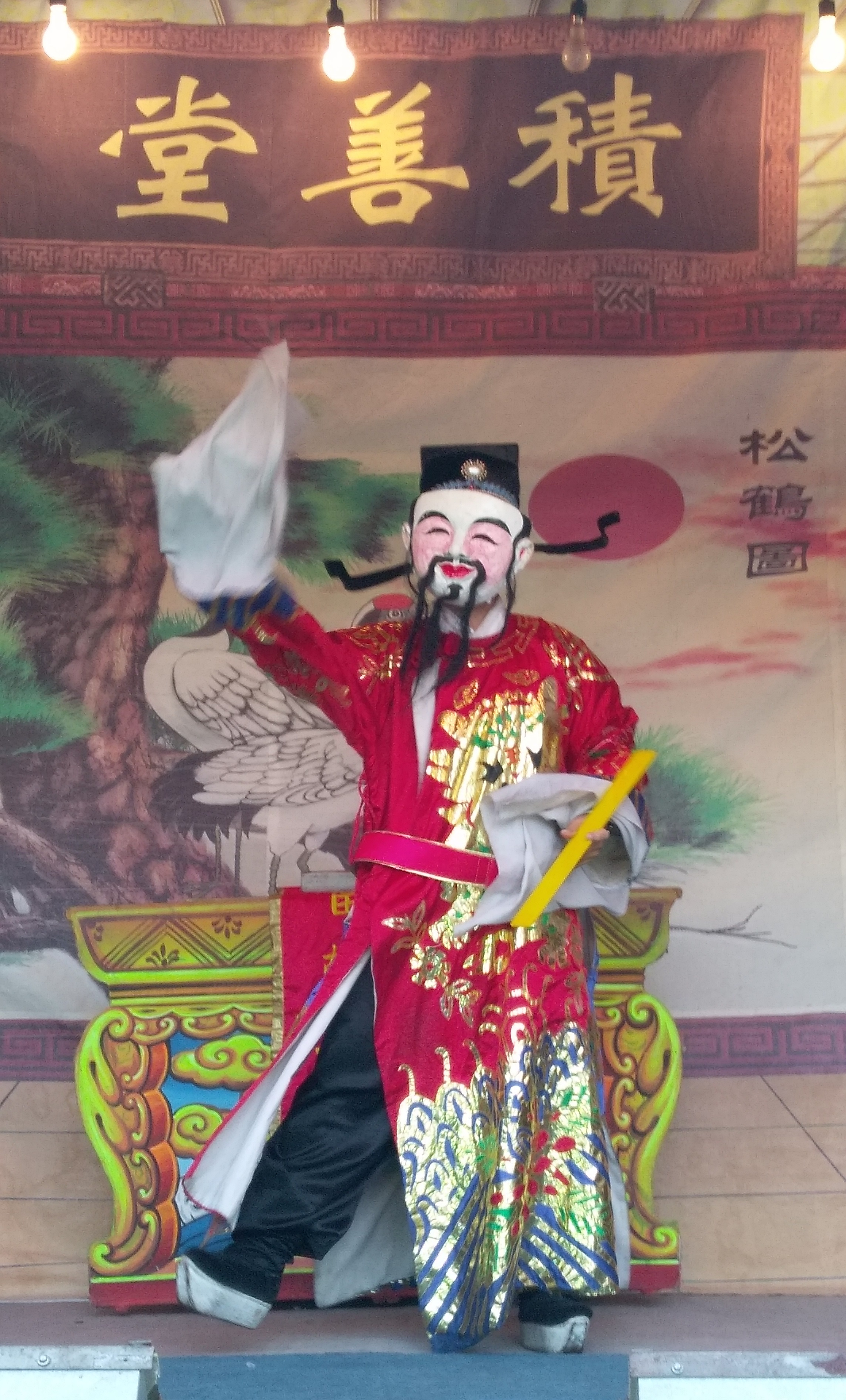 中文（台灣）: 扮仙跳加官